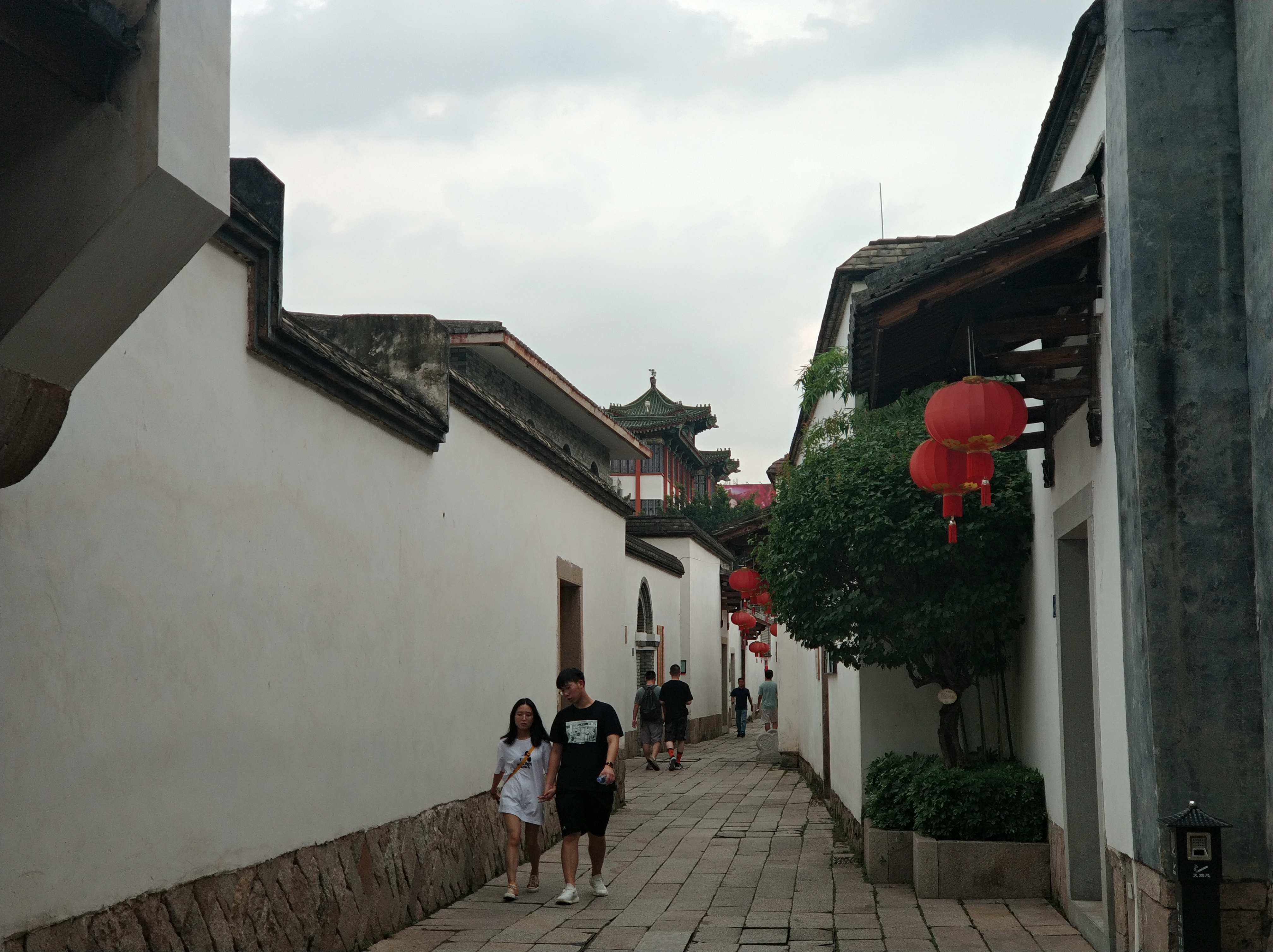 中文（中国大陆）: 三坊七巷和朱紫坊建筑群